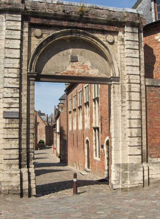 Main entrance gate Groot Begijnhof Leuven